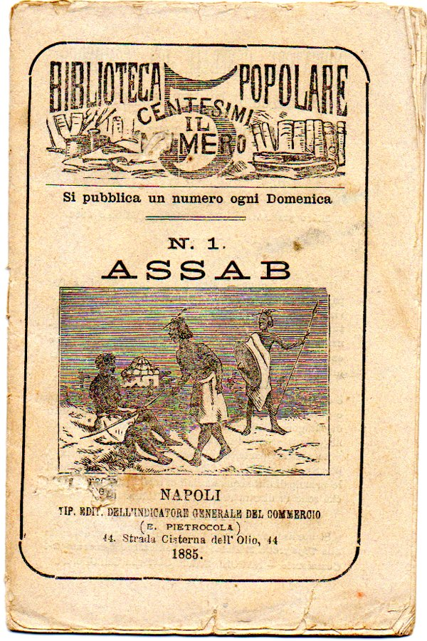 Primo numero della serie Biblioteca Popolare (E.Pietrocola) anno 1885 (da collezione privata personale)